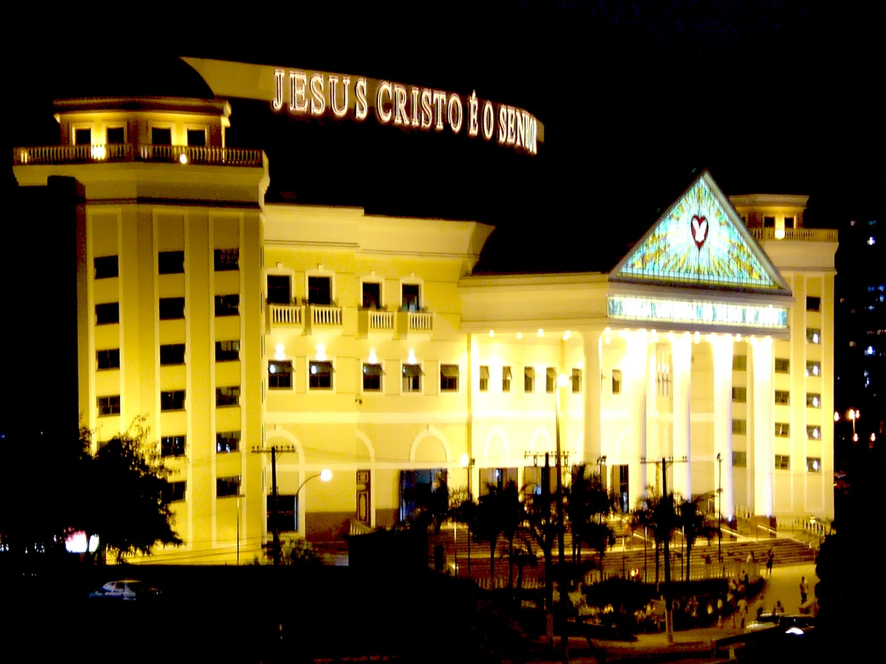 O templo maior da Igreja Universal do Reino de Deus, a "casa da moeda", visto do estacionamento do Shopping Iguatemi, em Salvador - BA.